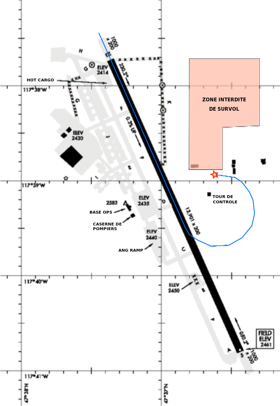 Fichier montrant la trajectoire de l'avion lors de l'accident du B-52 de la base de Fairchild en 1994, ainsi que la zone de survol interdit en orange.